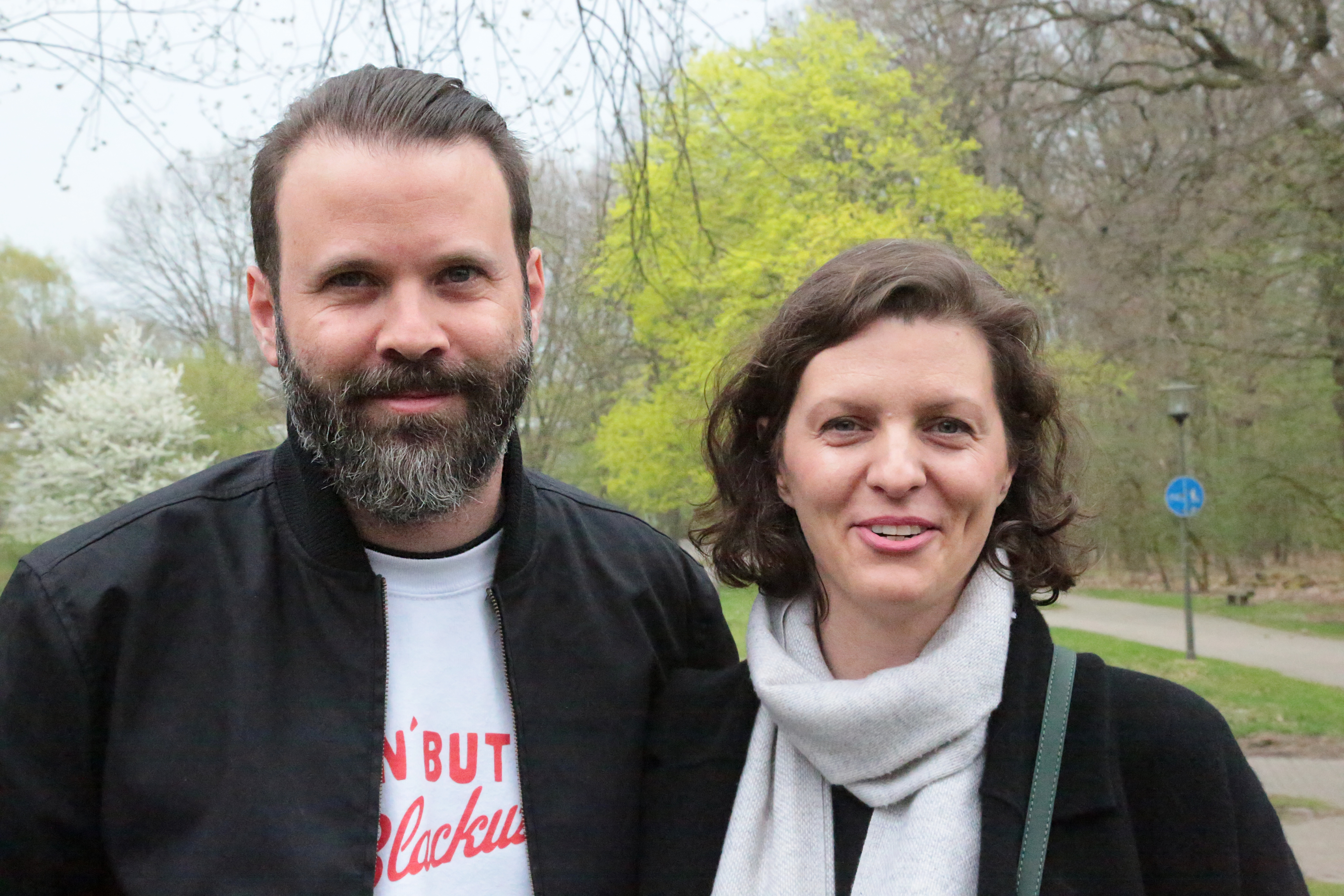 Jantje Friese und Baran bo Odar beim Grimme-Preis 2018, am 13.04.2018 in Marl.